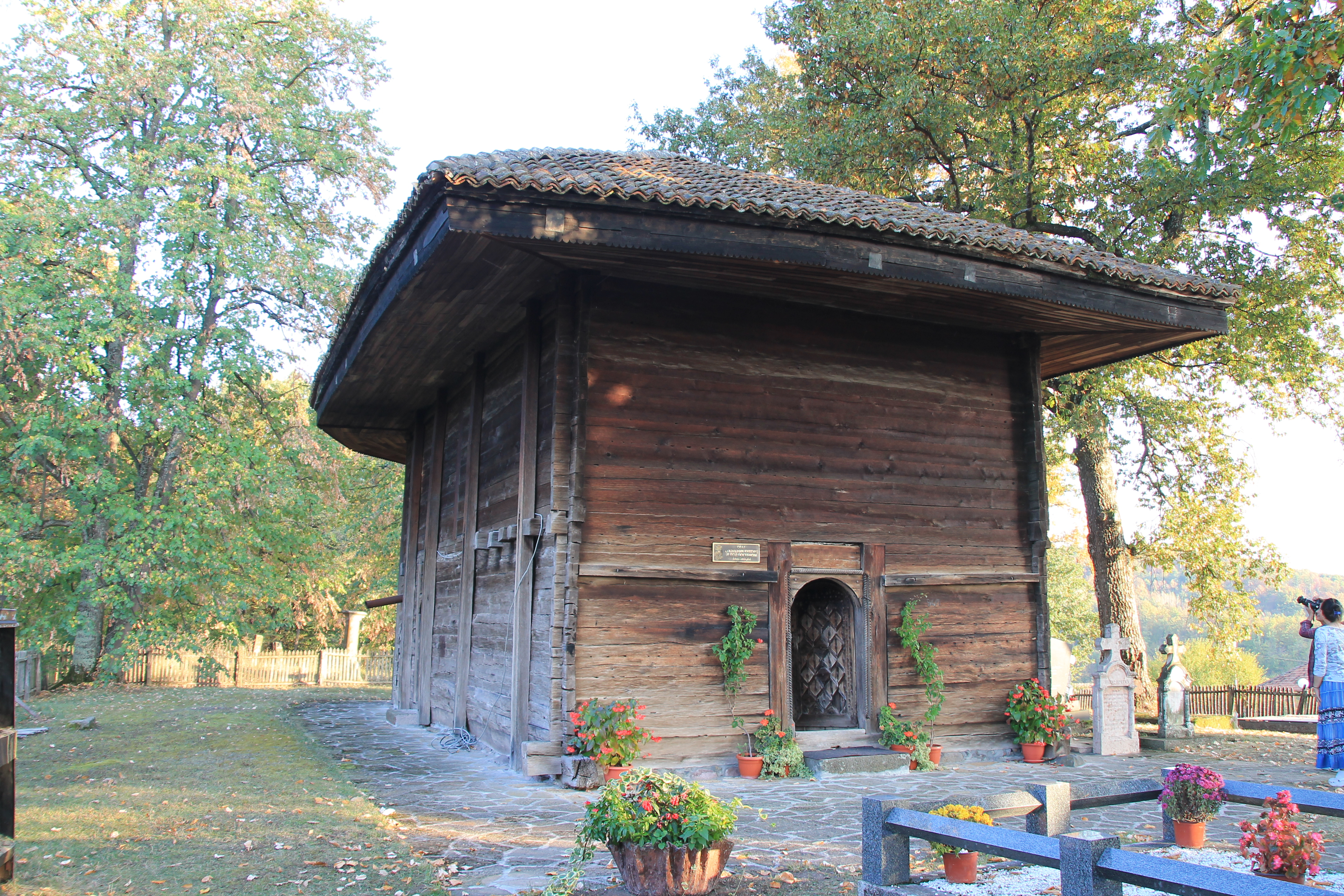 Crkva brvnara (Cvetke)